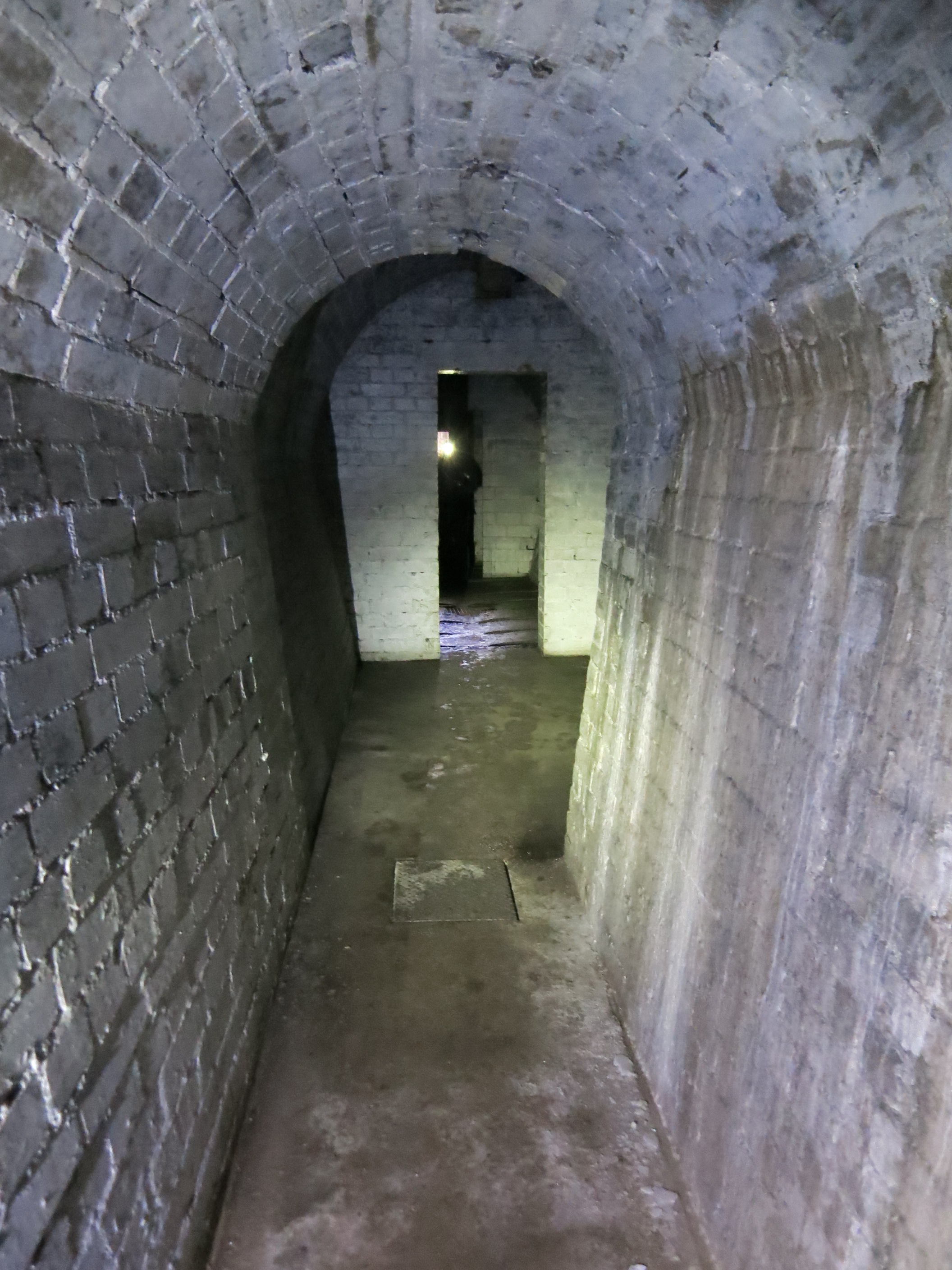 Festung Uetliberg, Buechhoger, Uitikon ZH, Schweiz